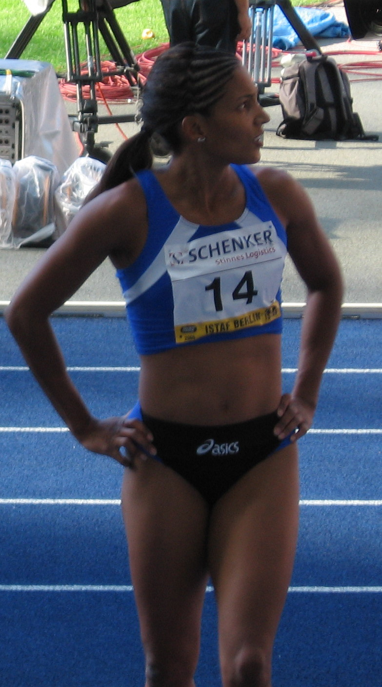 Christine Arron beim ISTAF 2005 in Berlin Privatfoto selbst fotografiert 4. September 2005